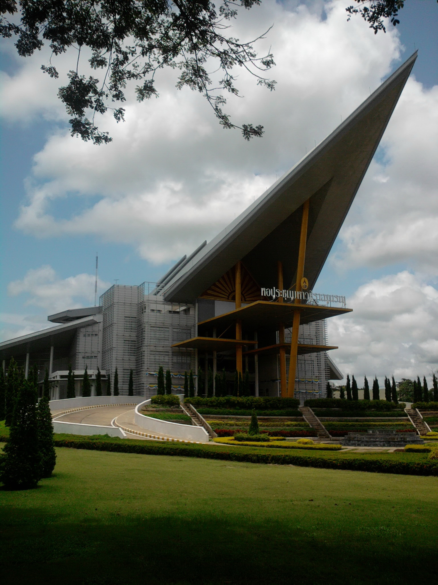 มหาวิทยาลัยราชภัฏสกลนคร